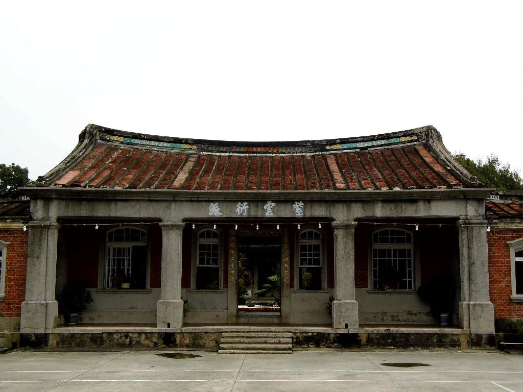 後壁黃家古厝